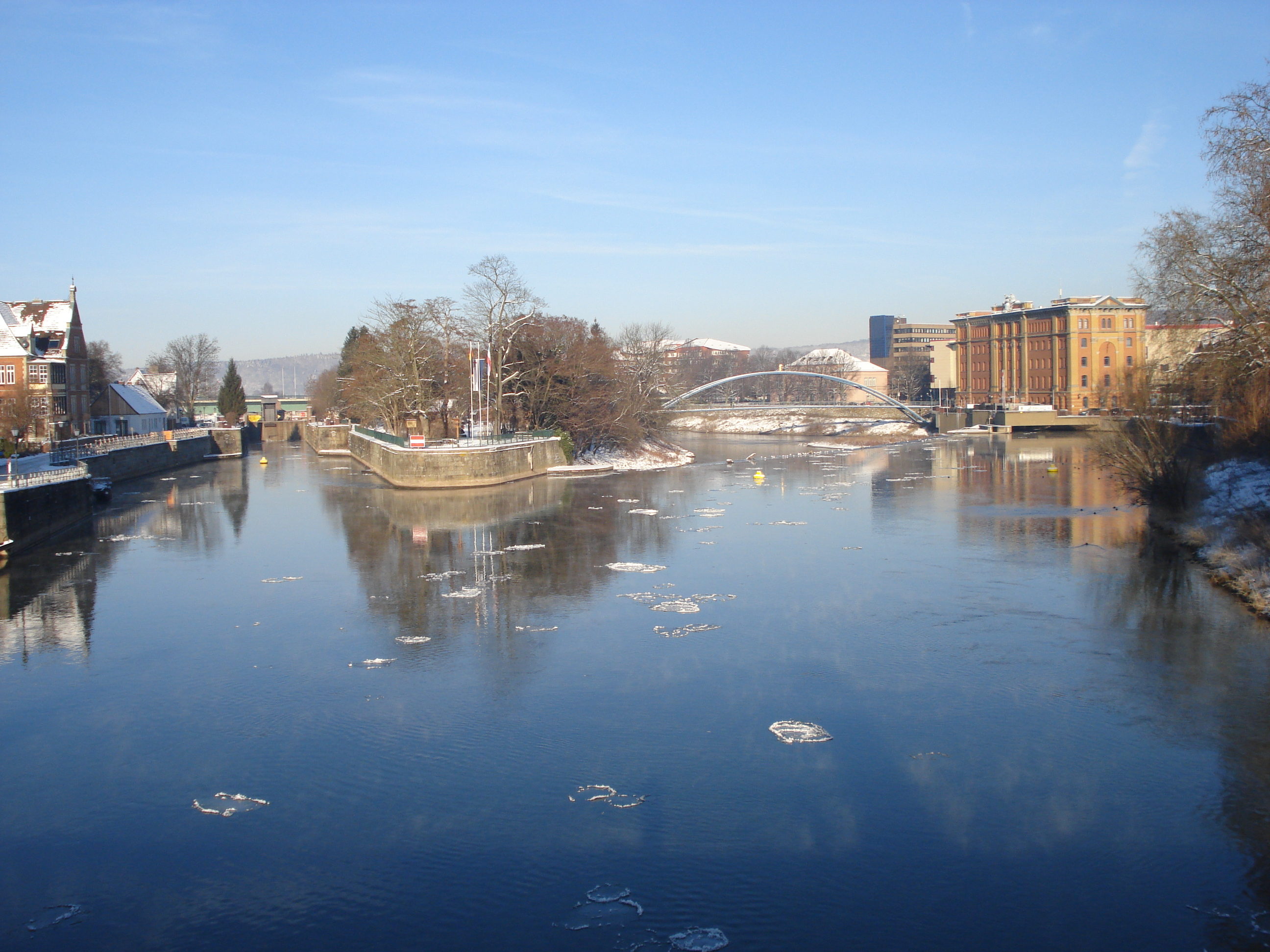 Die Weser in Hameln mitsamt dem Werder. Rechts im Hintergrund die Pfortmühle sowie das Kreiskrankenhaus.